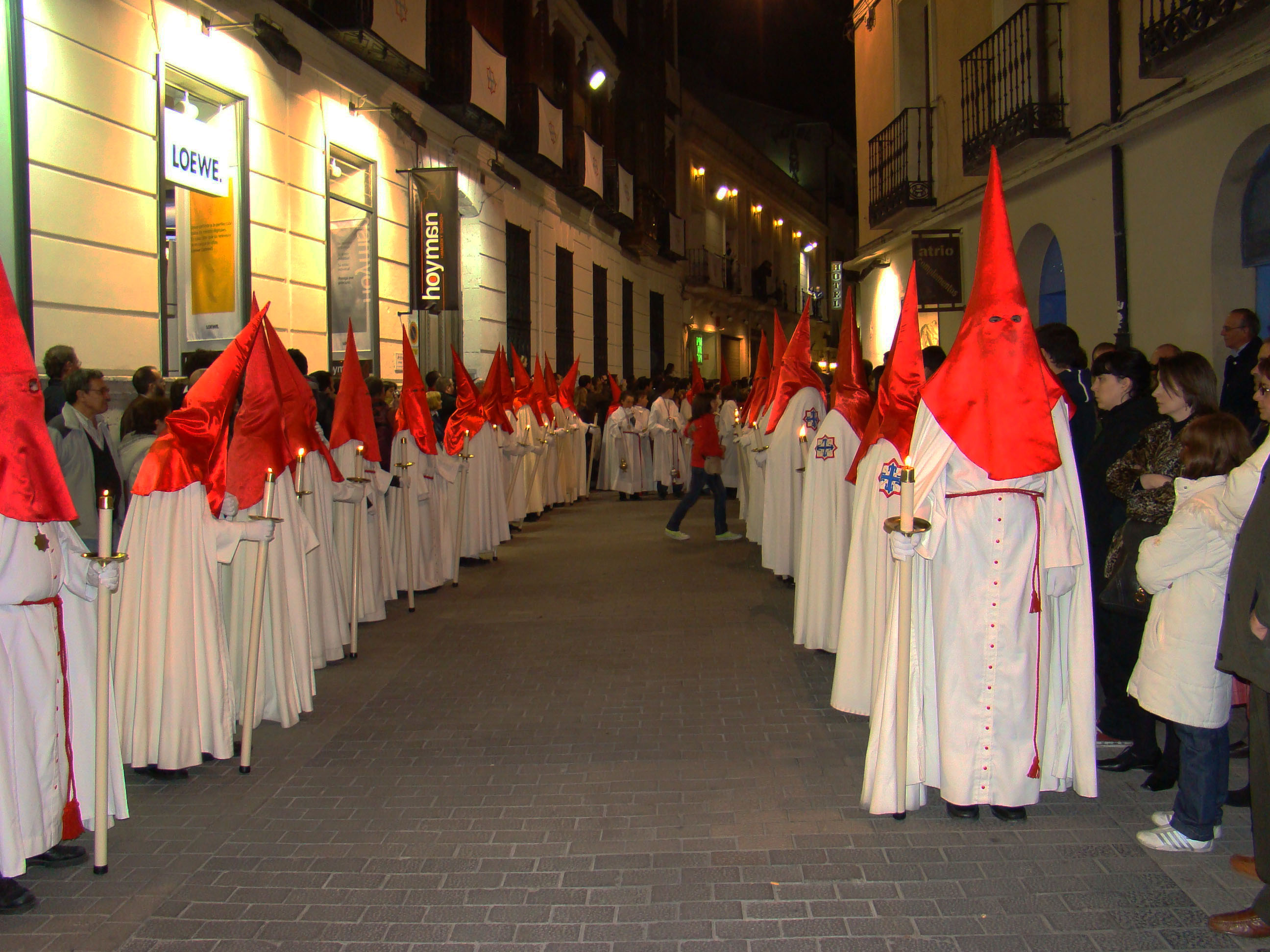 Procesión de Paz y Reconciliación. Cofradía de las Siete Palabras (Valladolid).